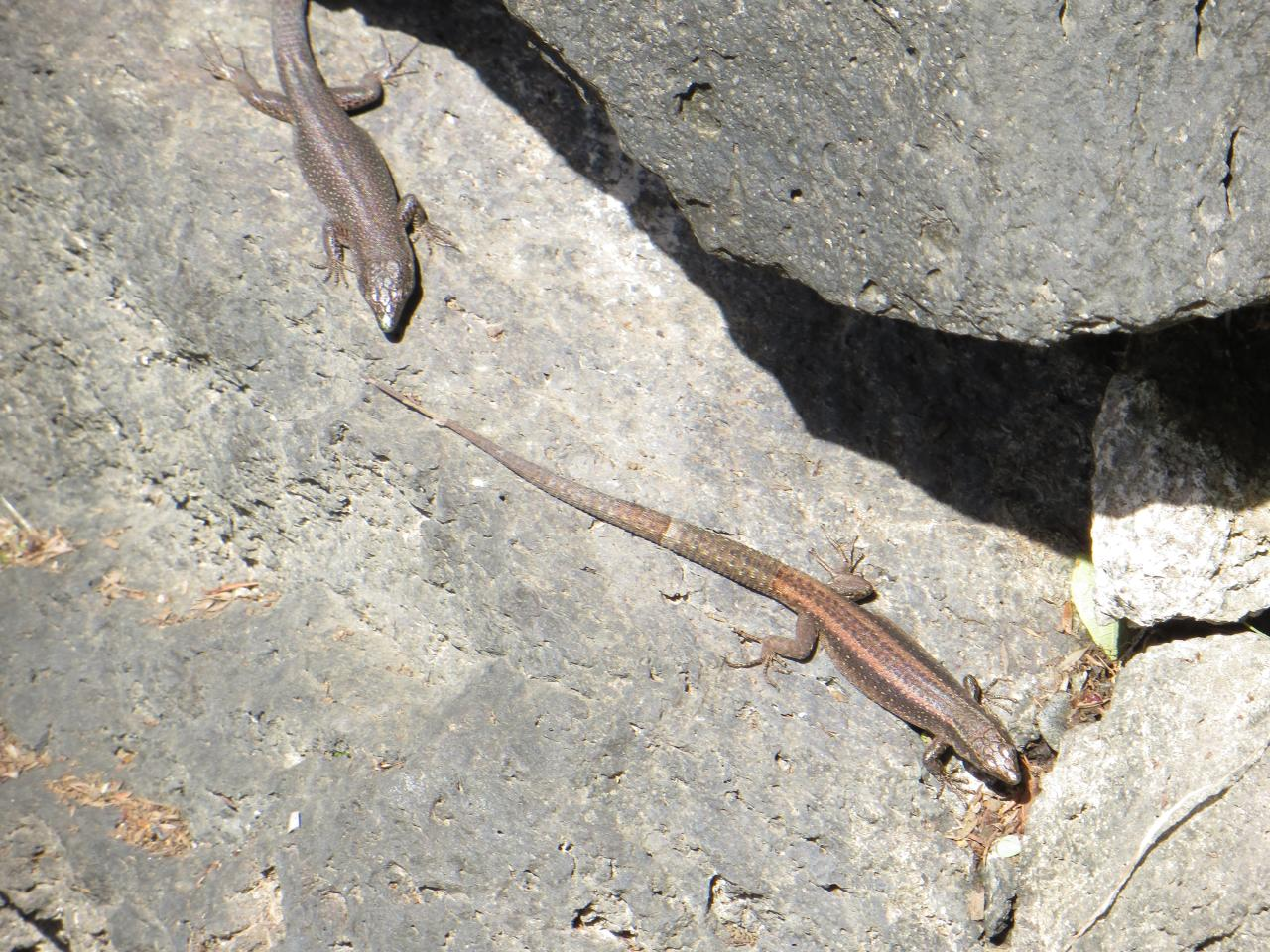 Monte Palace Tropical Garden, Funchal